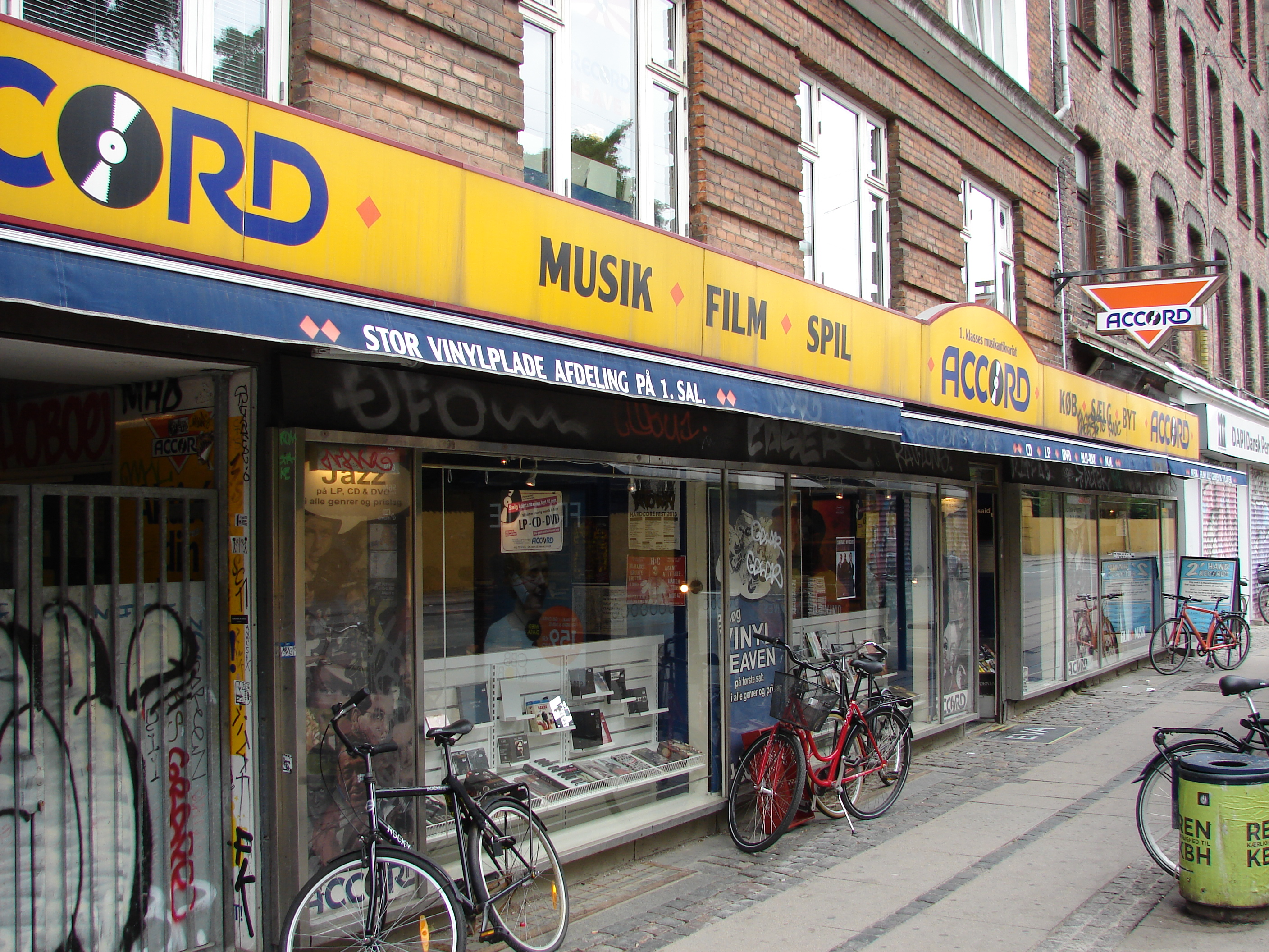 Plade- og filmbutik på Nørrebrogade, København